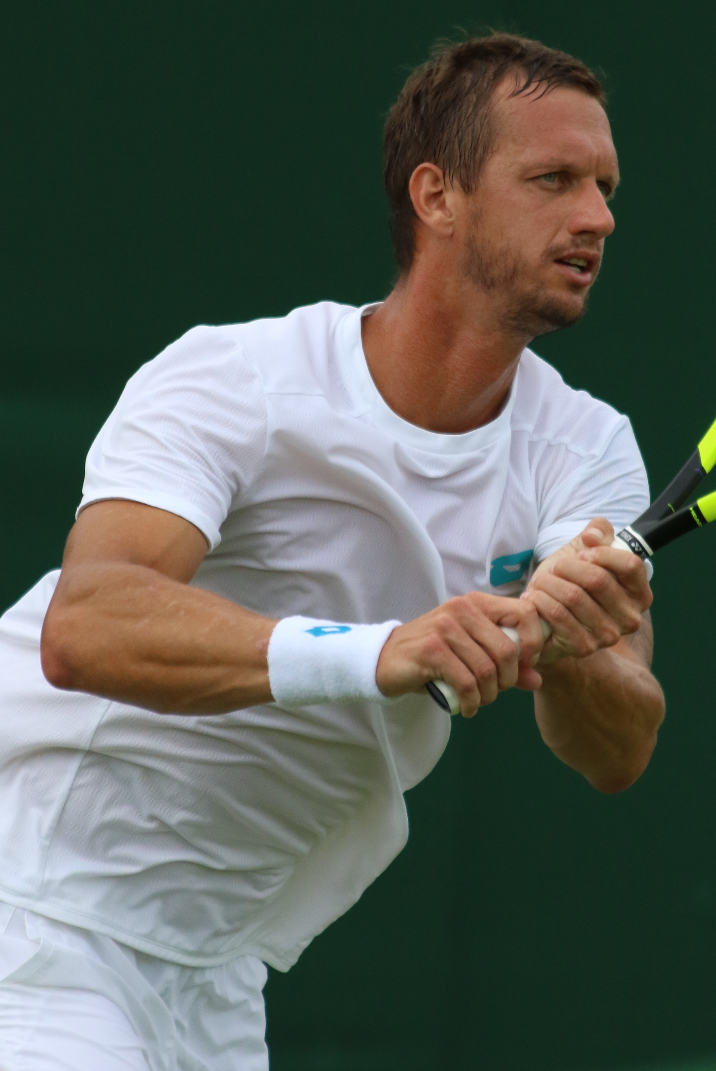 Polasek WM19 (47)